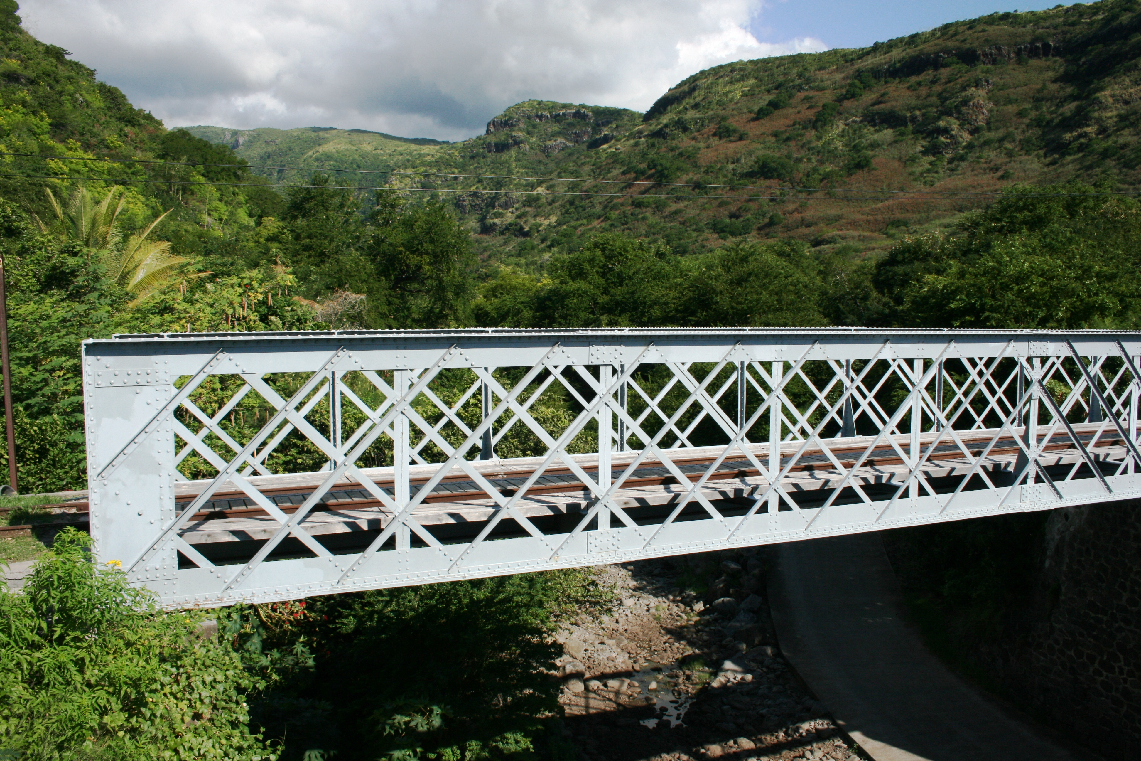 Vue d'un pont ferroviaire sur la Ravine de la Grande Chaloupe, à La Réunion.